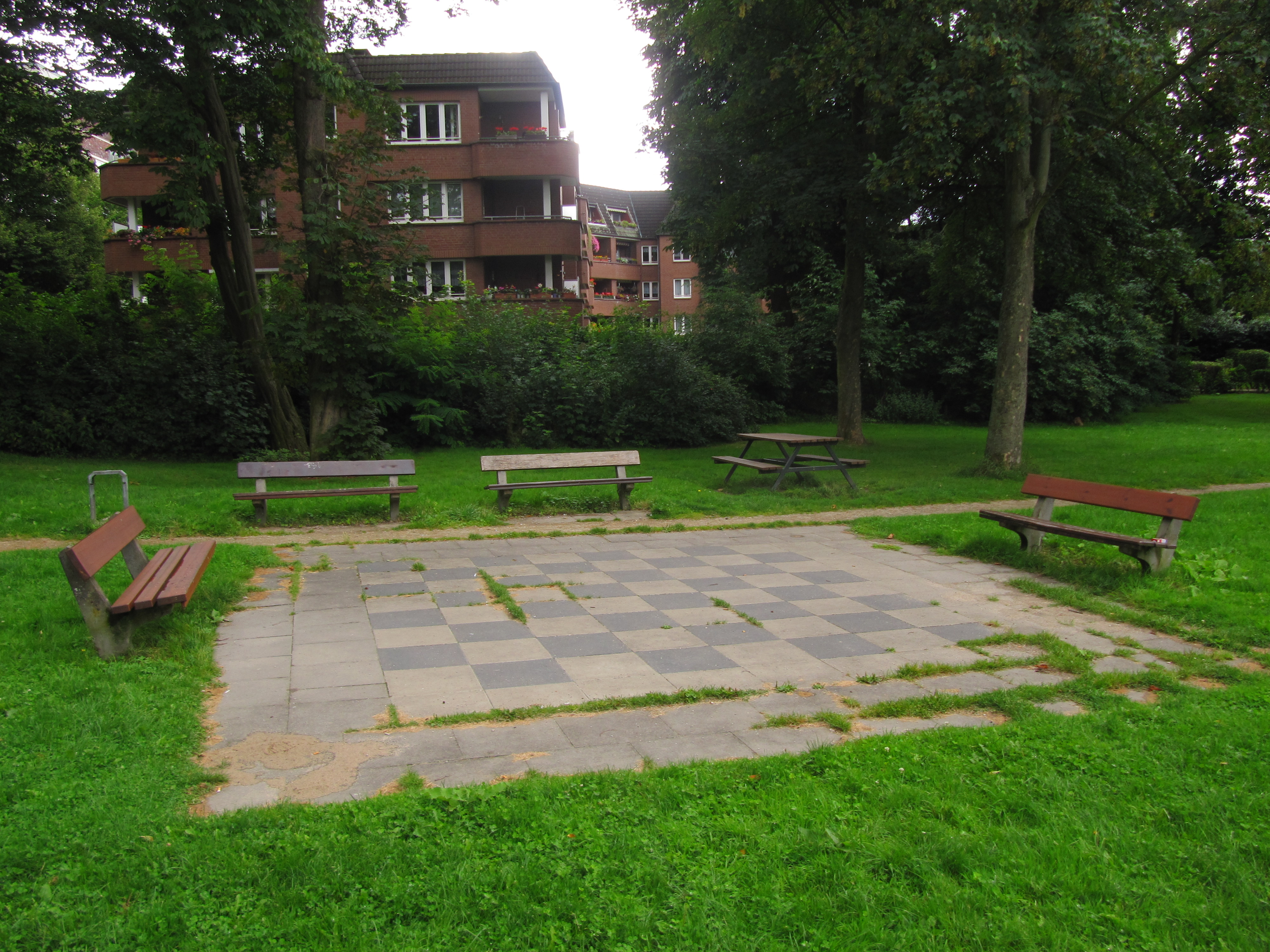 Von-Dratelnscher-Park Hamburg-Horn